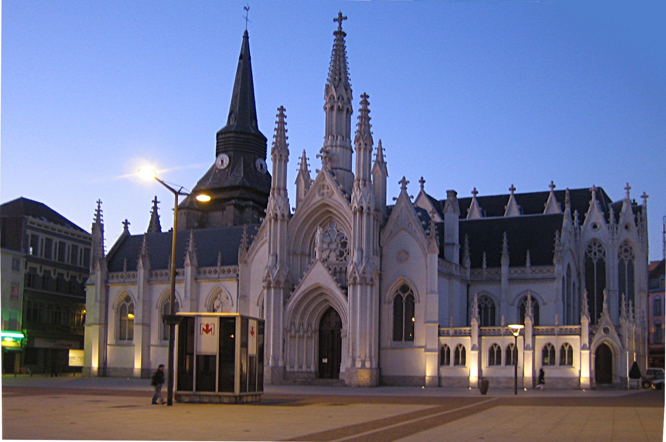 Eglise Saint-Martin, Roubaix